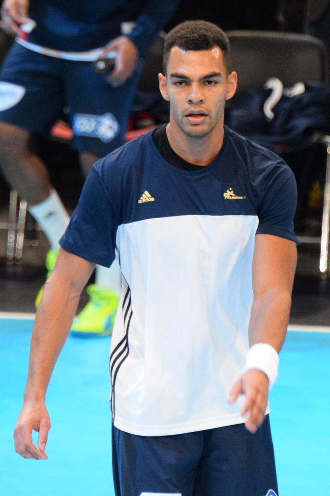 Le 10 janvier 2016 lors du match France / Danemark durant la Golden League à l'AccorHotels Arena (Paris).